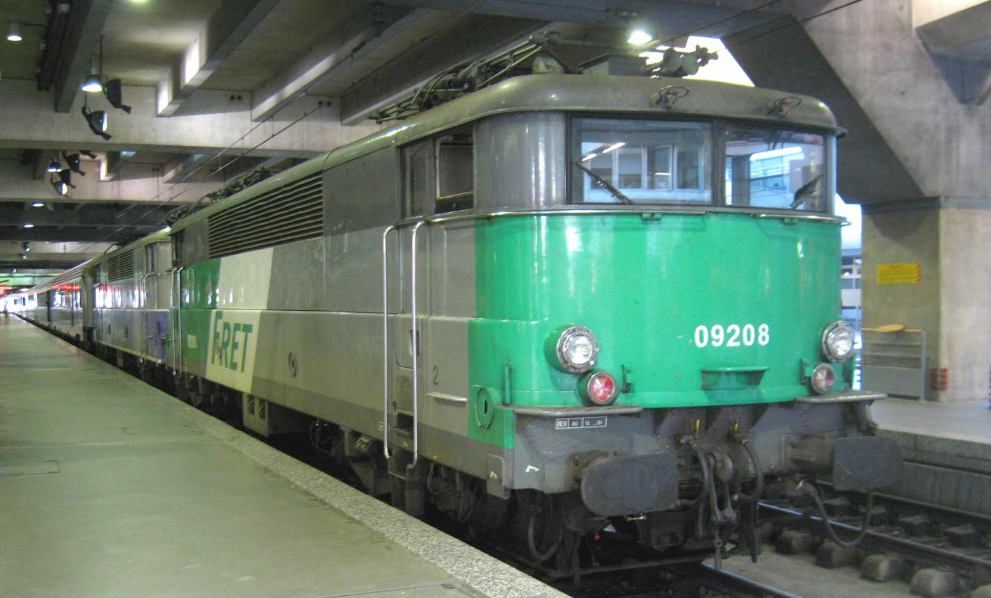 Locomotive electrique de la serie BB 9200 en livree Fret (reaffctee au TER Centre) a la gare Montparnasse Lieu : Paris, France Date : Juin 2006 Auteur : photo personnelle